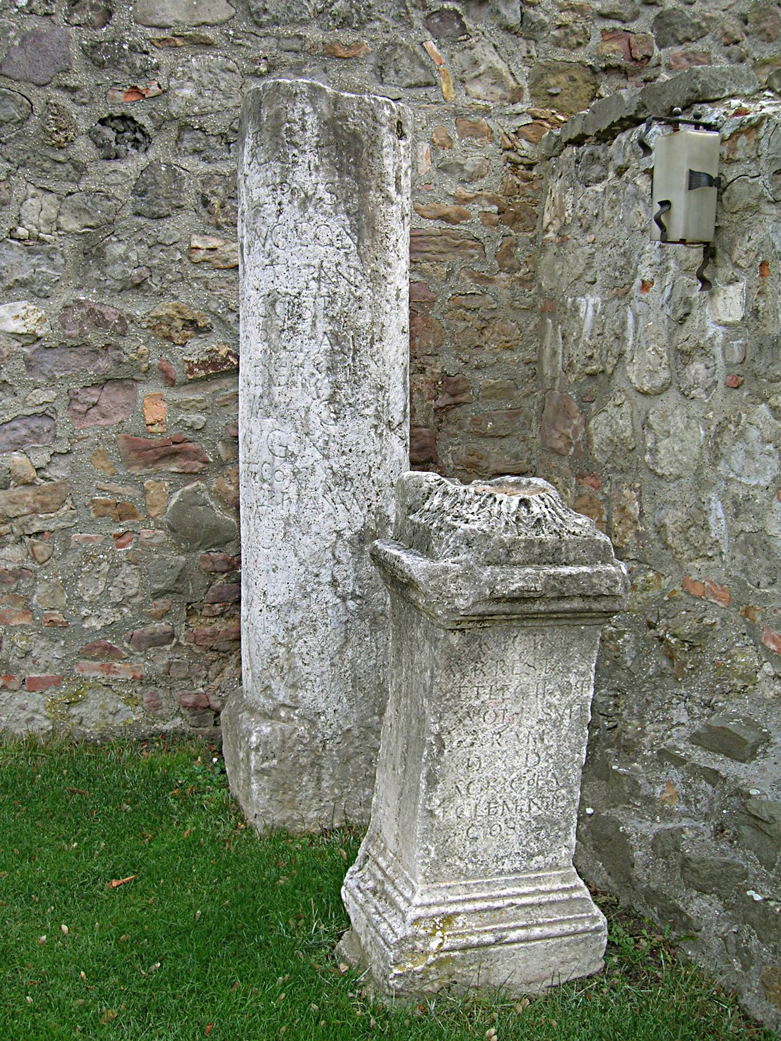 Kastellmuseum Esztergom, Ungarn: Römischer Meilenstein und Weihealtar. Der möglicherweise aus Aquincum oder Pilisvörösvár stammende Altarstein aus dem Jahr 230 n. Chr. (Konsulardatierung) hat die Belegstellen CIL III 10594 = CIL III 10408; AE 1941, 00014; RIU 03, 0775; Abb. 775 (Foto u. Zeichnung), Prosopographia Imperii Romani V 476, Prosopographia Imperii Romani (2. Aufl.) C 564, SIRIS 00671, TitAq-01, 00084